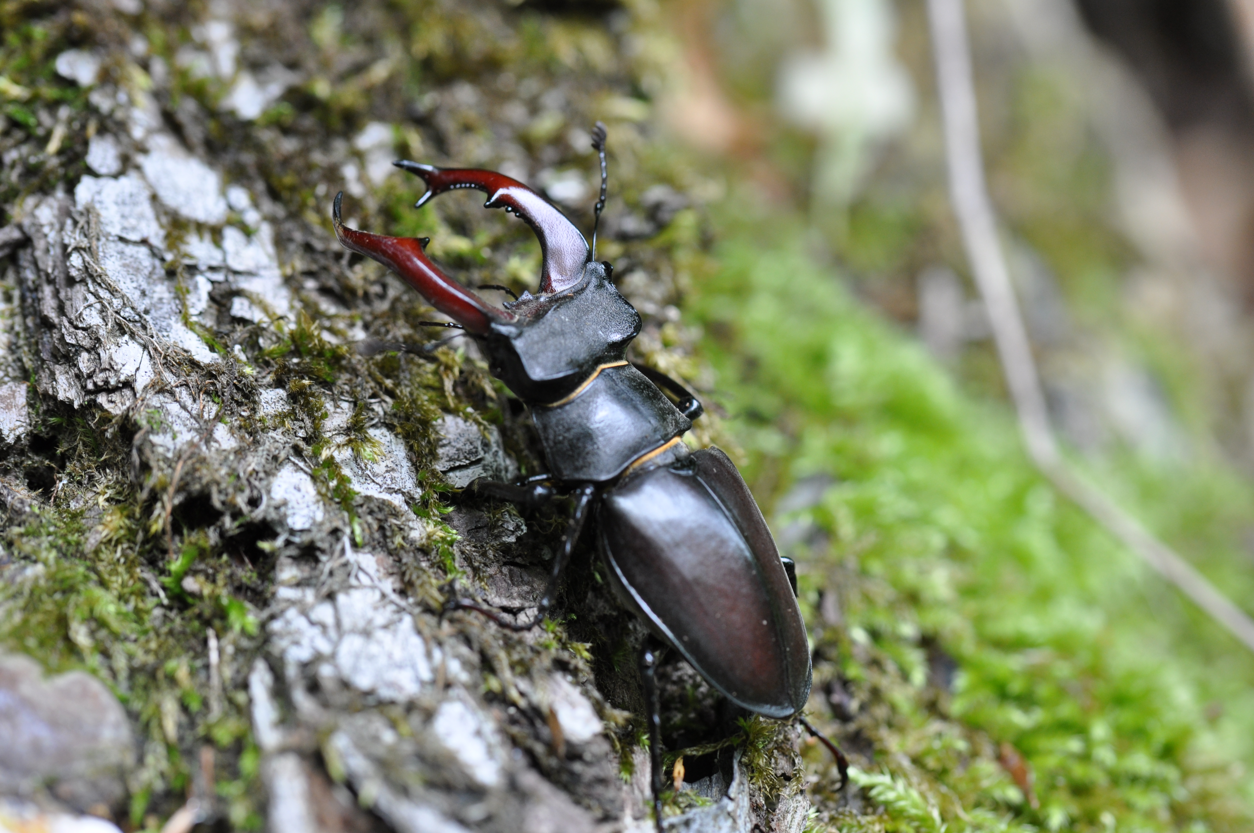 Hirschkäfer (lucanus cervus)